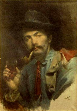 Self-portrait